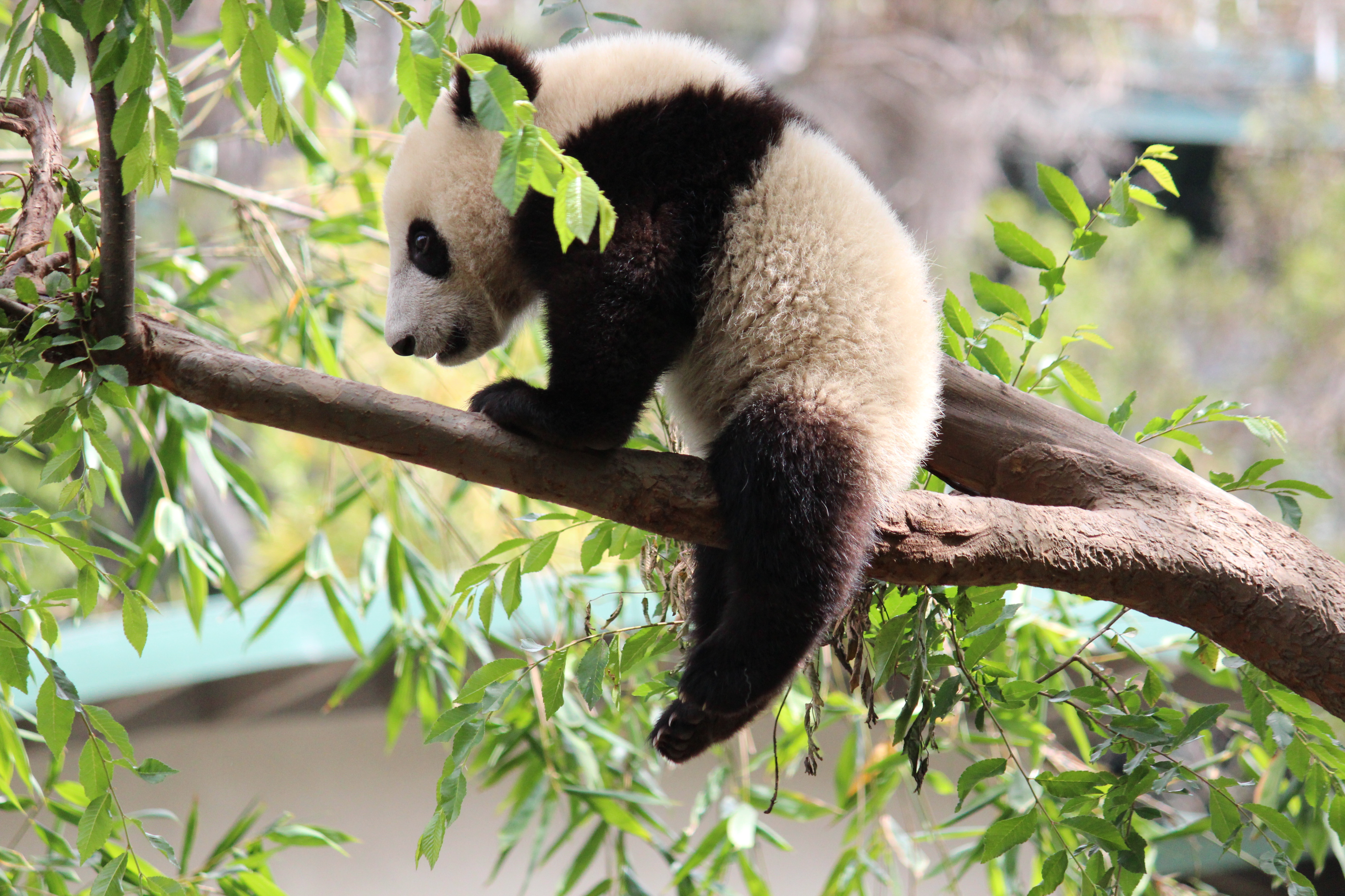 Mai 2013 - Foto: Johann Balleis